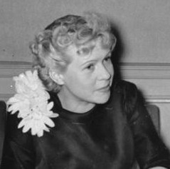 ADN/ZB/Archiv Im faschistischen Deutschland 1938 Kameradschaftsabend anläßlich der Tagung der Reichsfilmkammer in der Kameradschaft der Deutschen Künstler in Berlin am 4. März 1938; v.l. Fita Benkhoff, der Reichsfilmdramaturg von Demandowsky und Hilde Krüger. 3006-38 [Scherl Bilderdienst]